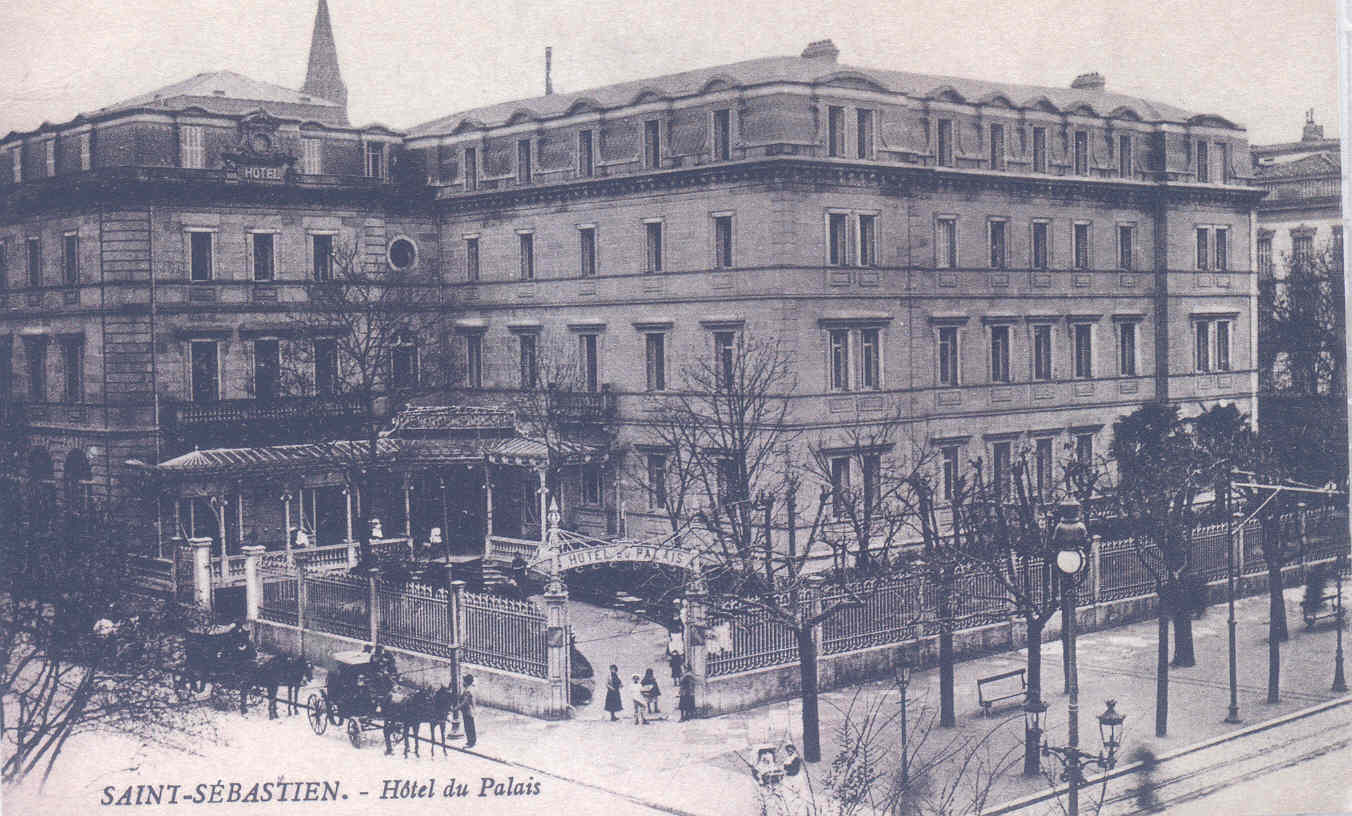 Hotel du Palais Donostia